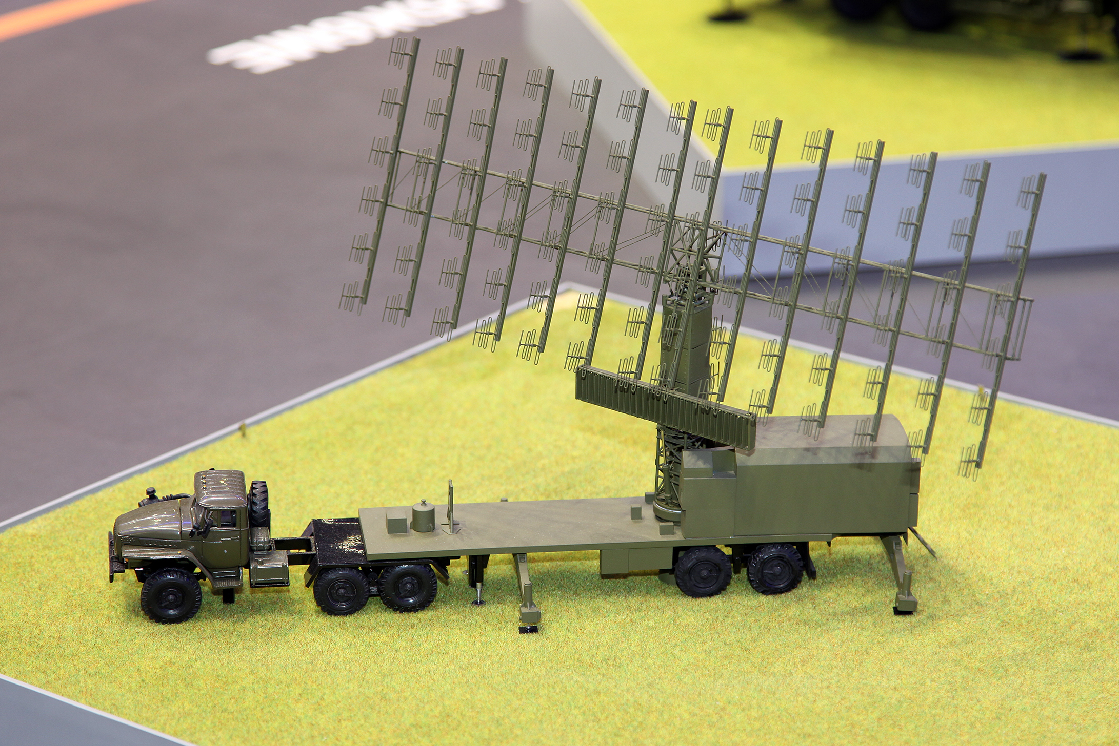 Модель РЛС Небо-СВУ (Nebo-SVU radar model)